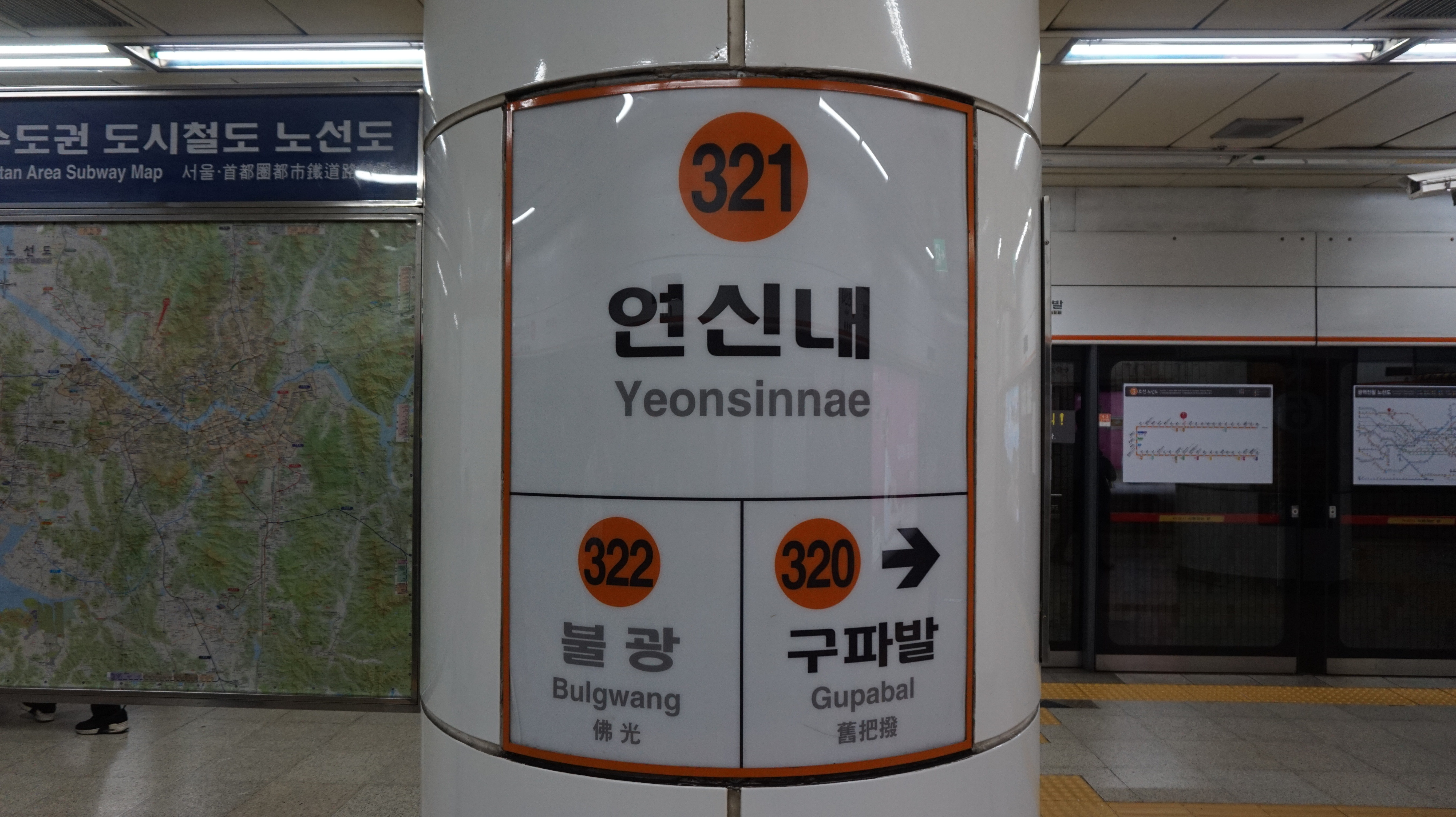 3호선 연신내역 역명판